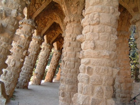 Photographie du Parc Güell.